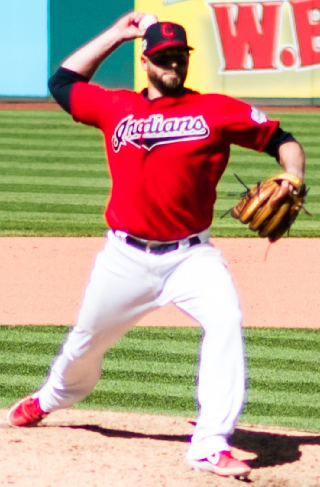 Seattle Mariners VS. Cleveland Indians